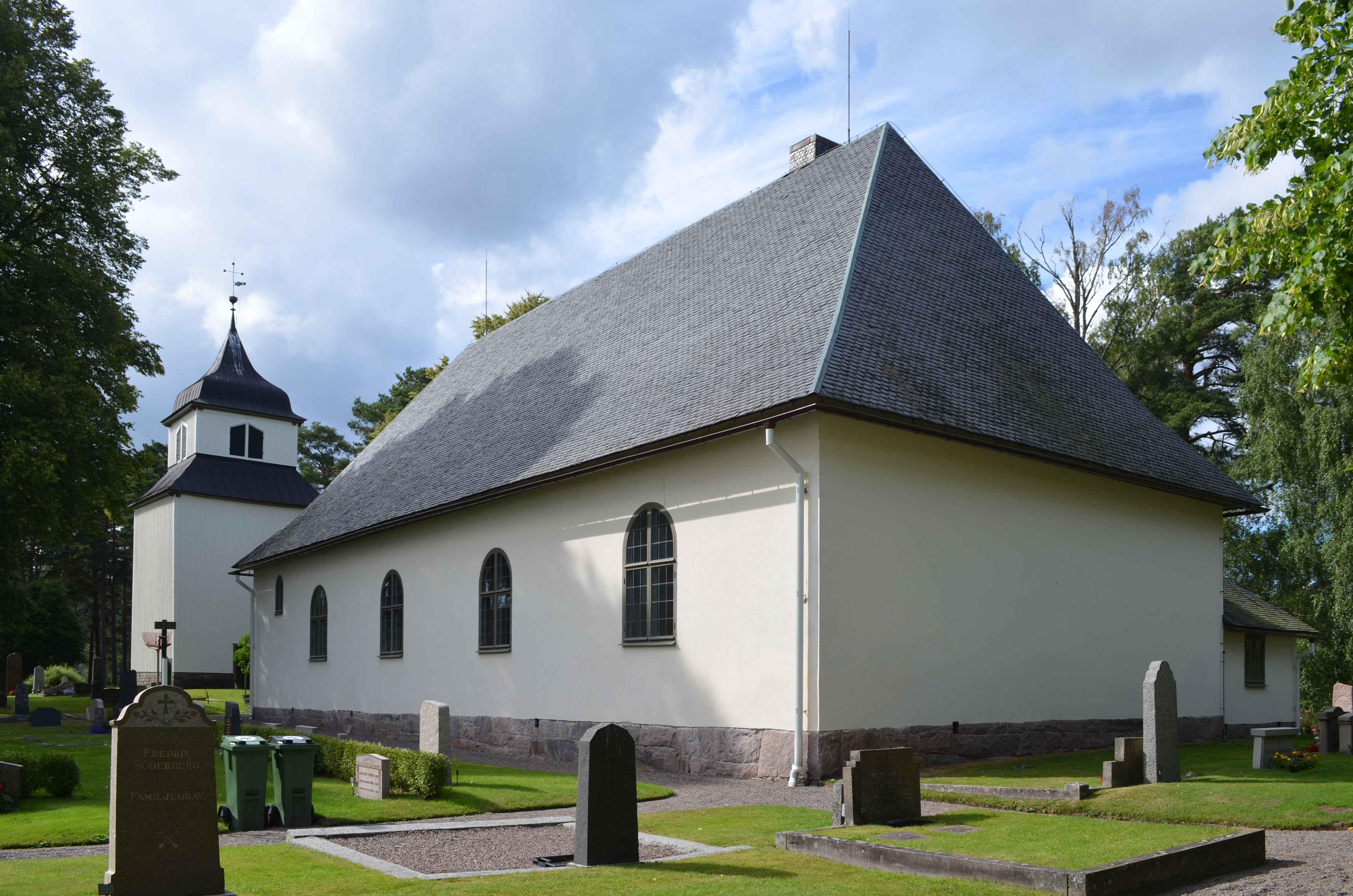 Älvsbacka kyrka 2017